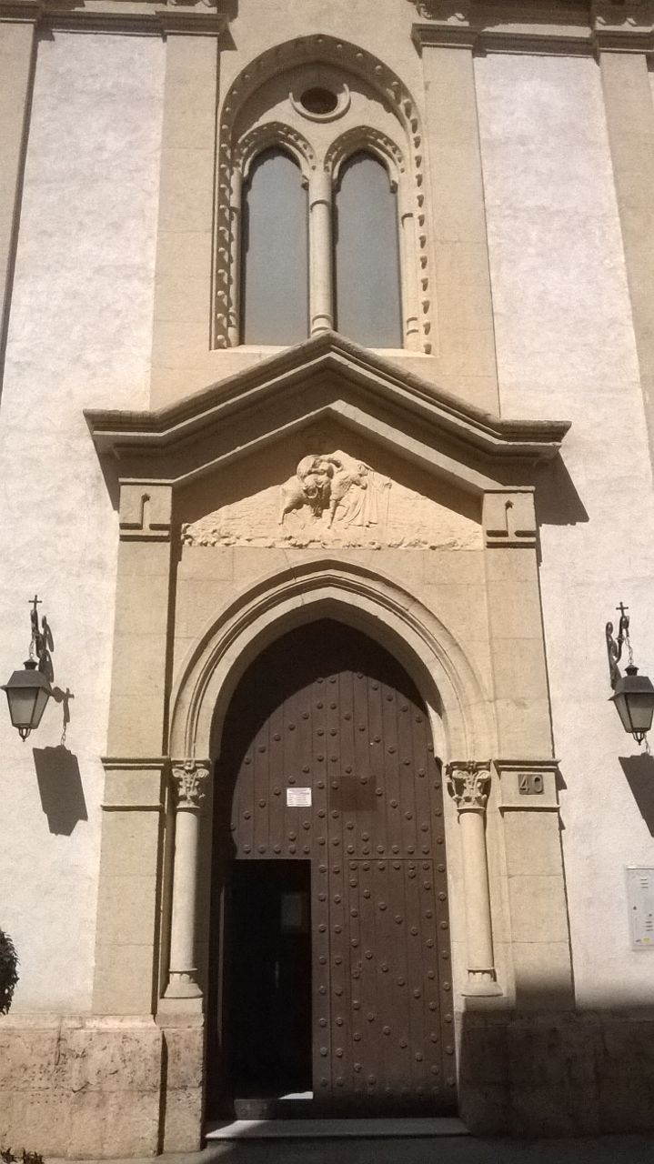 Iglesia de la Sagrada Familia o de San Nicolás. Iglesia católica construida en 1905-1906. Adscrita desde 2008 a la Iglesia greco-católica rumana en plena comunión con la Iglesia católica. Se caracteriza por sus vanos apuntados neogóticos y otros elementos neorrománicos y de un clasicismo de libre interpretación. Su torre central está cubierta por una cúpula de ocho gajos y susfrescos son obra de los pintores Carlos López Redondo y Joaquín Martínez Acosta. El estilo del interior se ajusta actualmente a la estética del rito greco-católico, destacando elementos como el iconostasio antes mencionado.